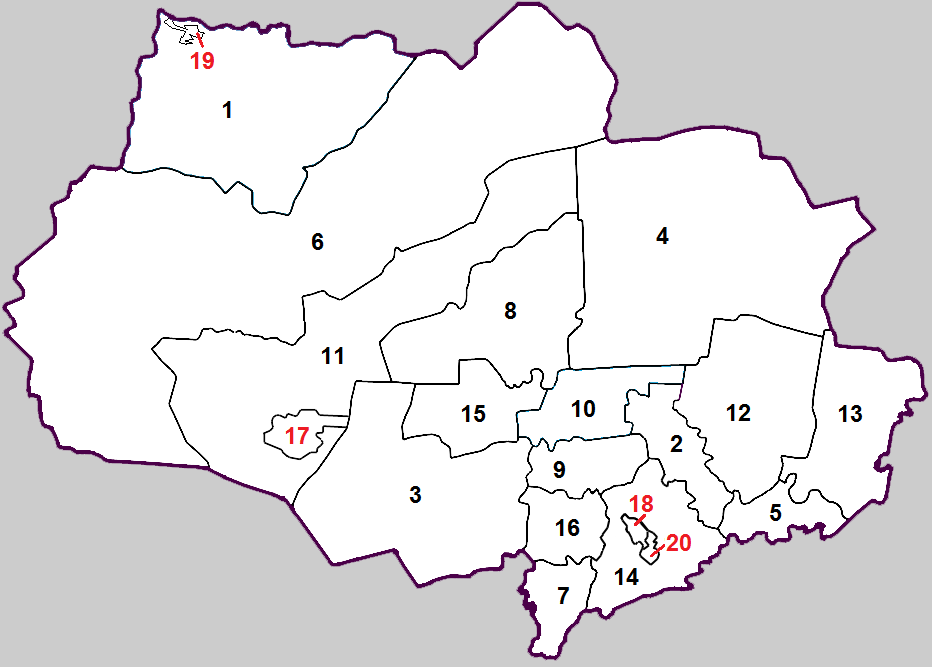 Административное деление Томской области (1-16 - района, 17-20 - города областного подчинения)